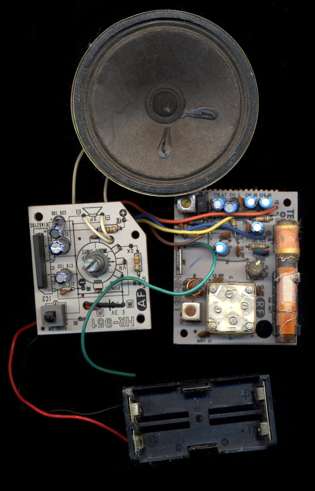 radio